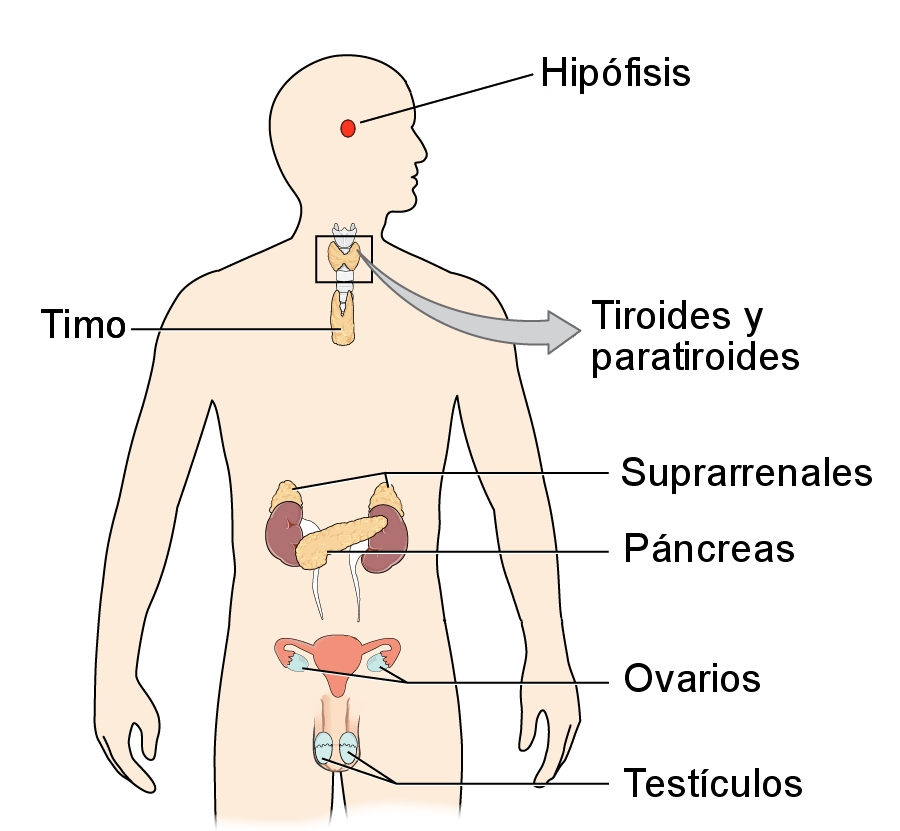 Esquema en el que se representan las principales glándulas que constituyen el sistema endocrino humano.